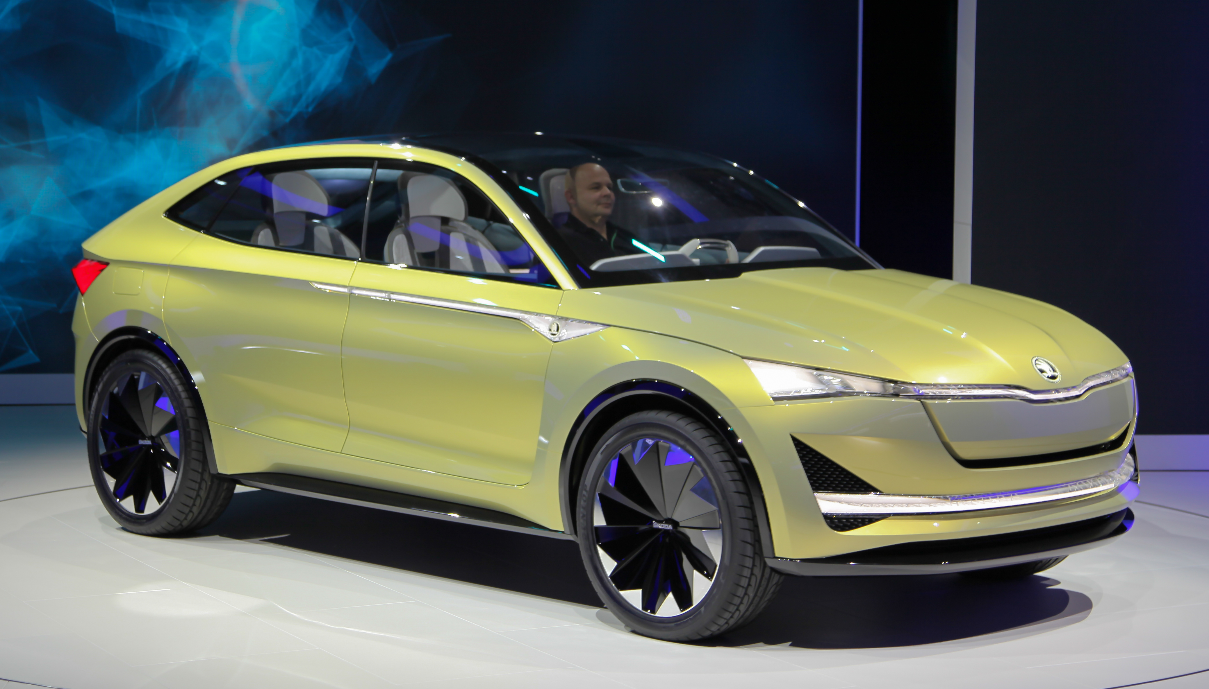 Skoda Vision E auf der IAA 2017